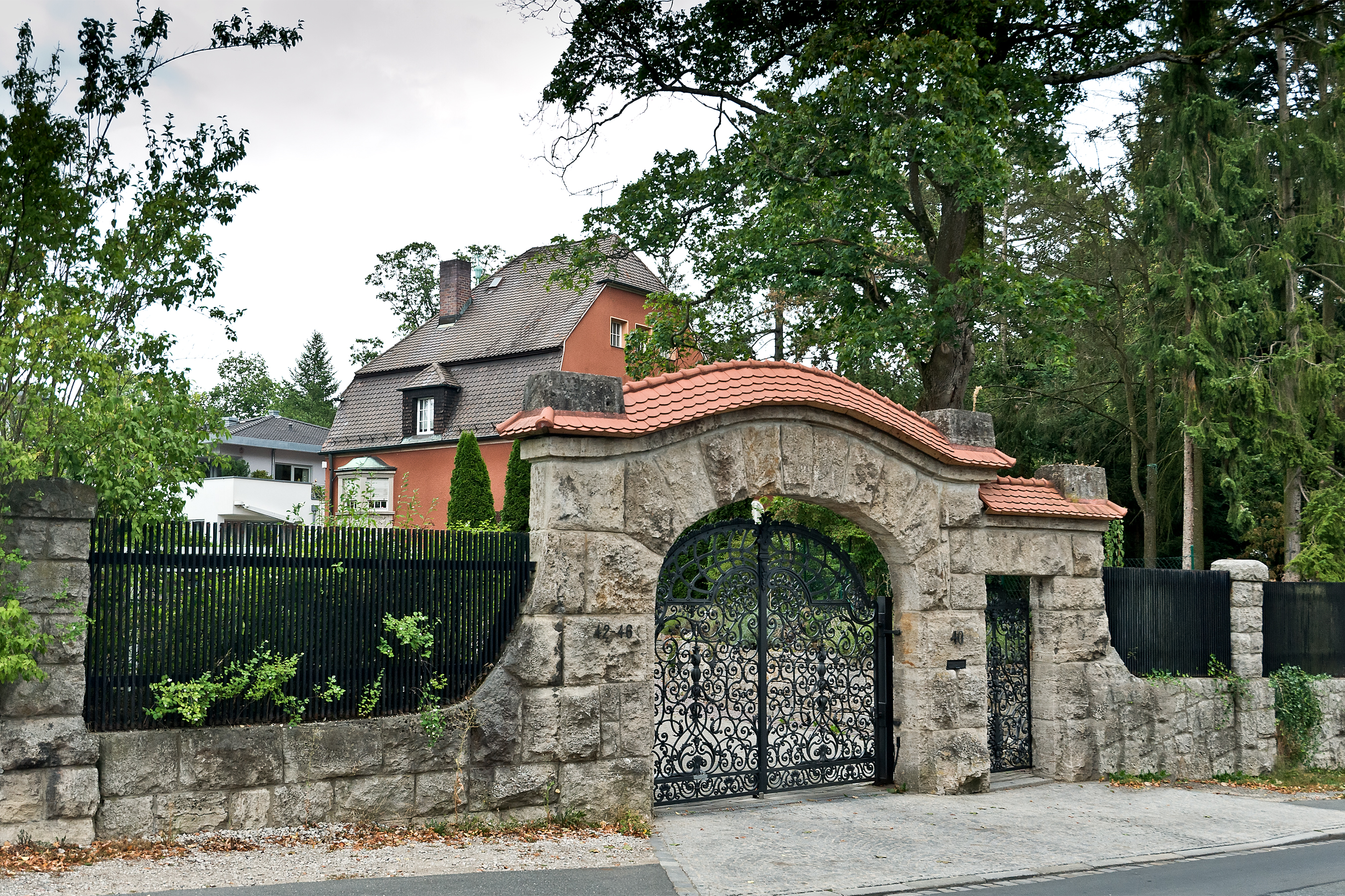 Villa Brünn, Forsthausstraße 40, Dambach This is a photograph of an architectural monument.